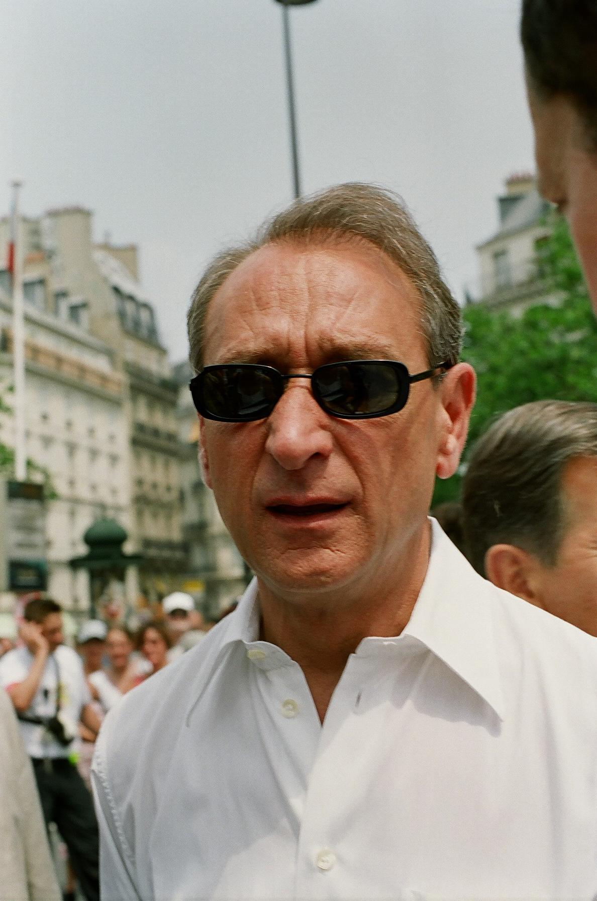 Bertrand Delanoë dans les rues de Paris